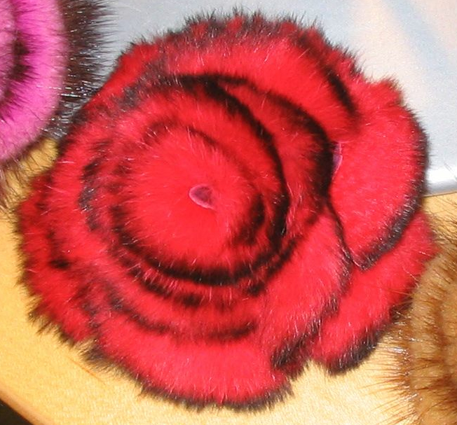 Ansteckblumen aus Nerzfell, vorn Mitte rote Kaninblume. :Gesehen bei Firma CHR. SCHAD PELZ UND LEDER, Ludwigshafen